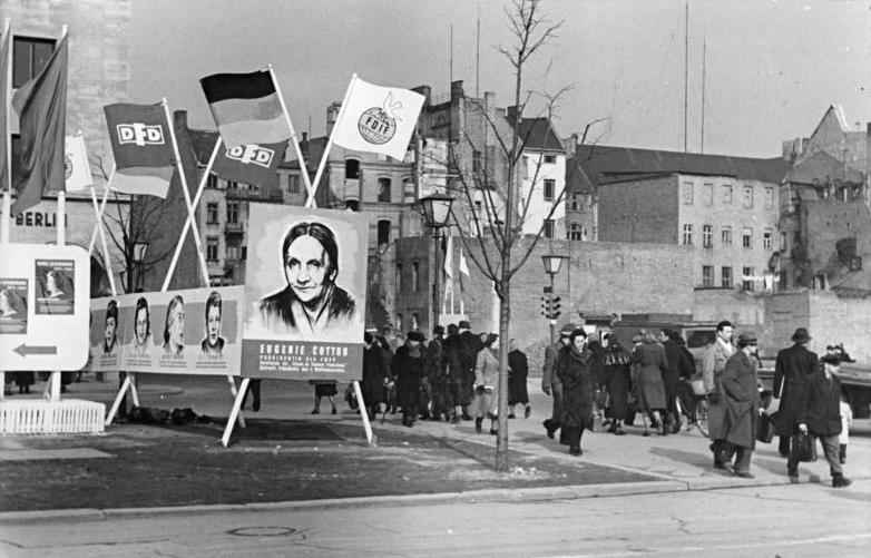 Berlin, Unter den Linden, Ruinen, Bildtafeln Illus Sturm 7.3.1951 Internationaler Frauentag. Zur 41. Wiederkehr des Internationalen Frauentags am 8. März 1951 wurden die Straßen Berlins festlich geschmückt. UBz: Unter den Linden wurden Bildertafeln mit Porträts der Vorsitzenden der IDFF (Internationale Demokratische Frauenföderation) aufgestellt.